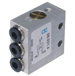 Zawór logiczny z oferty PressMann